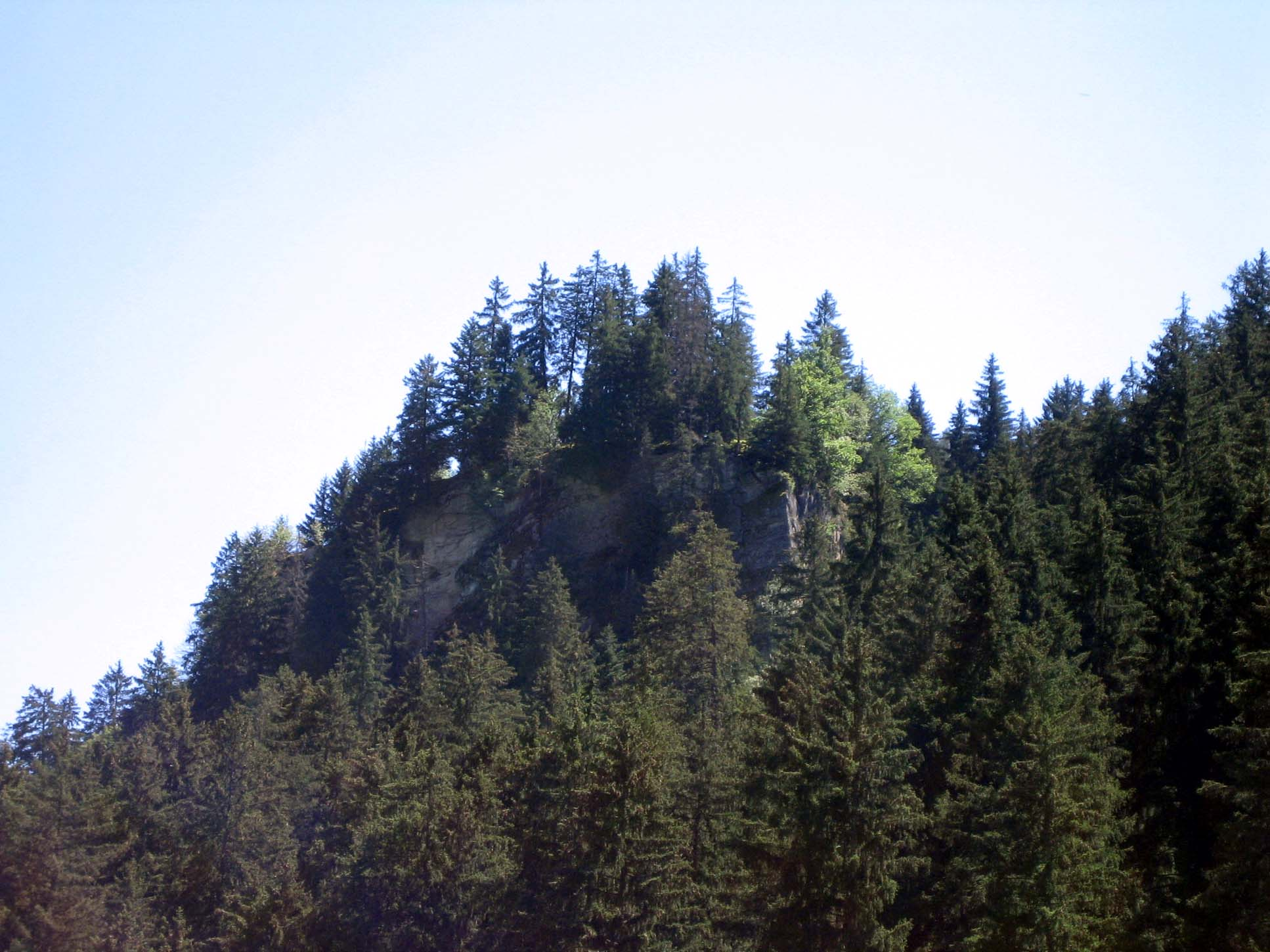 Lage ob Tavanasa